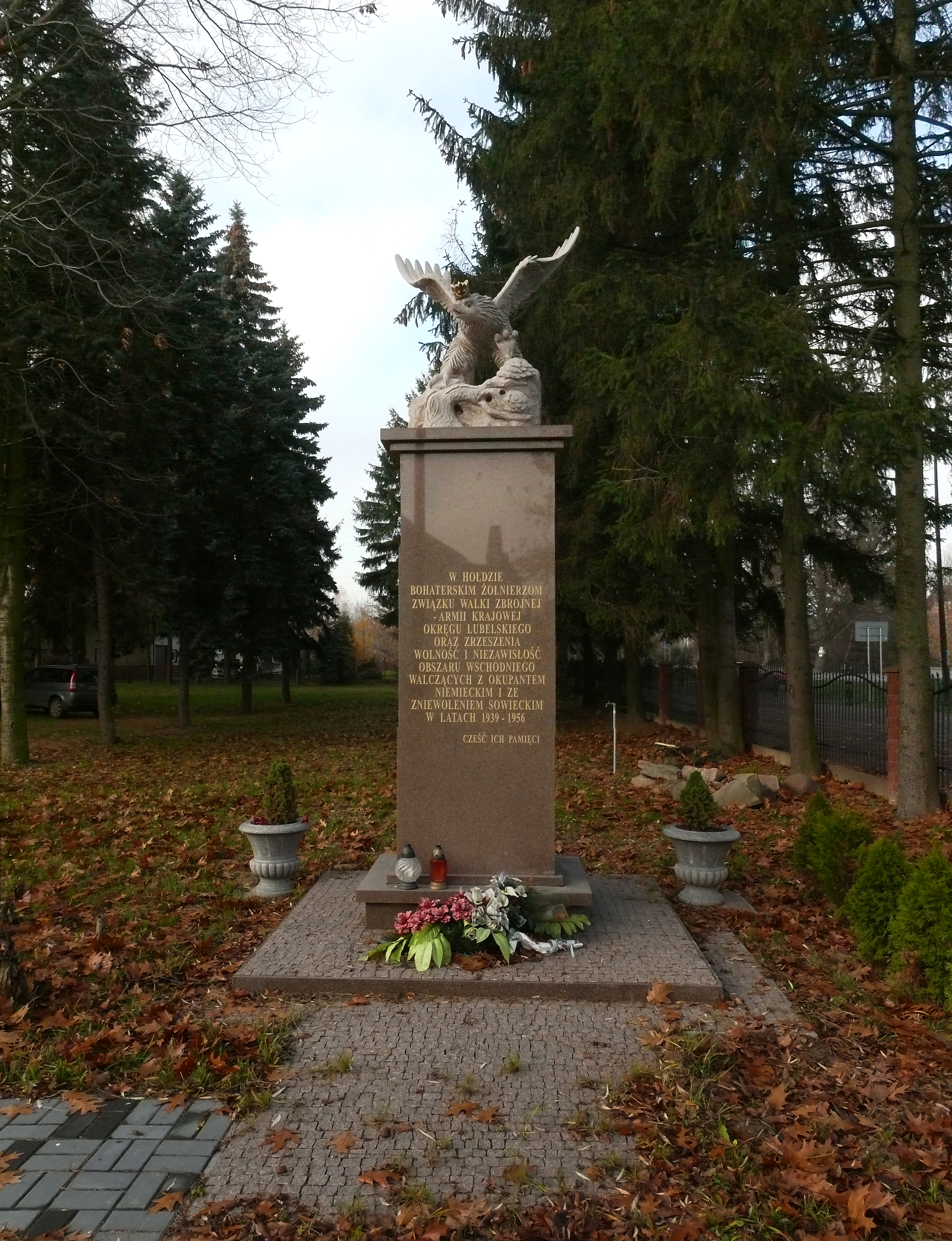 monument, upamiętniający zasługi żołnierzy WiN w walce o wyzwolenie Polski spod sowieckiej "opieki"